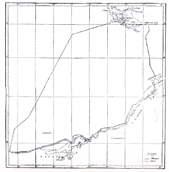 Itinéraire de la Belgica en antarctique établi par le cdt de Gerlache